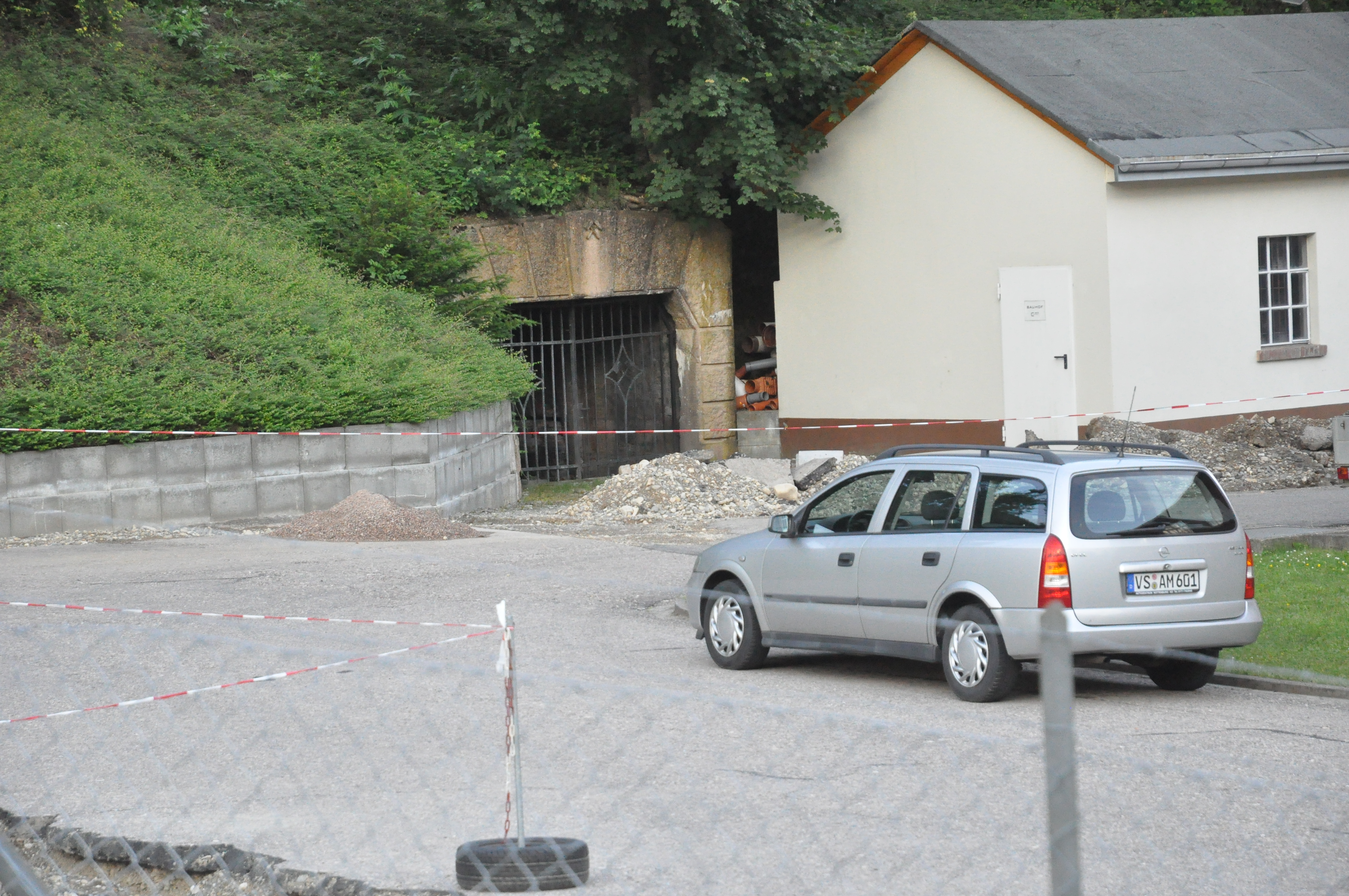 Unterer Stollenmund Nordwerk Blumberg